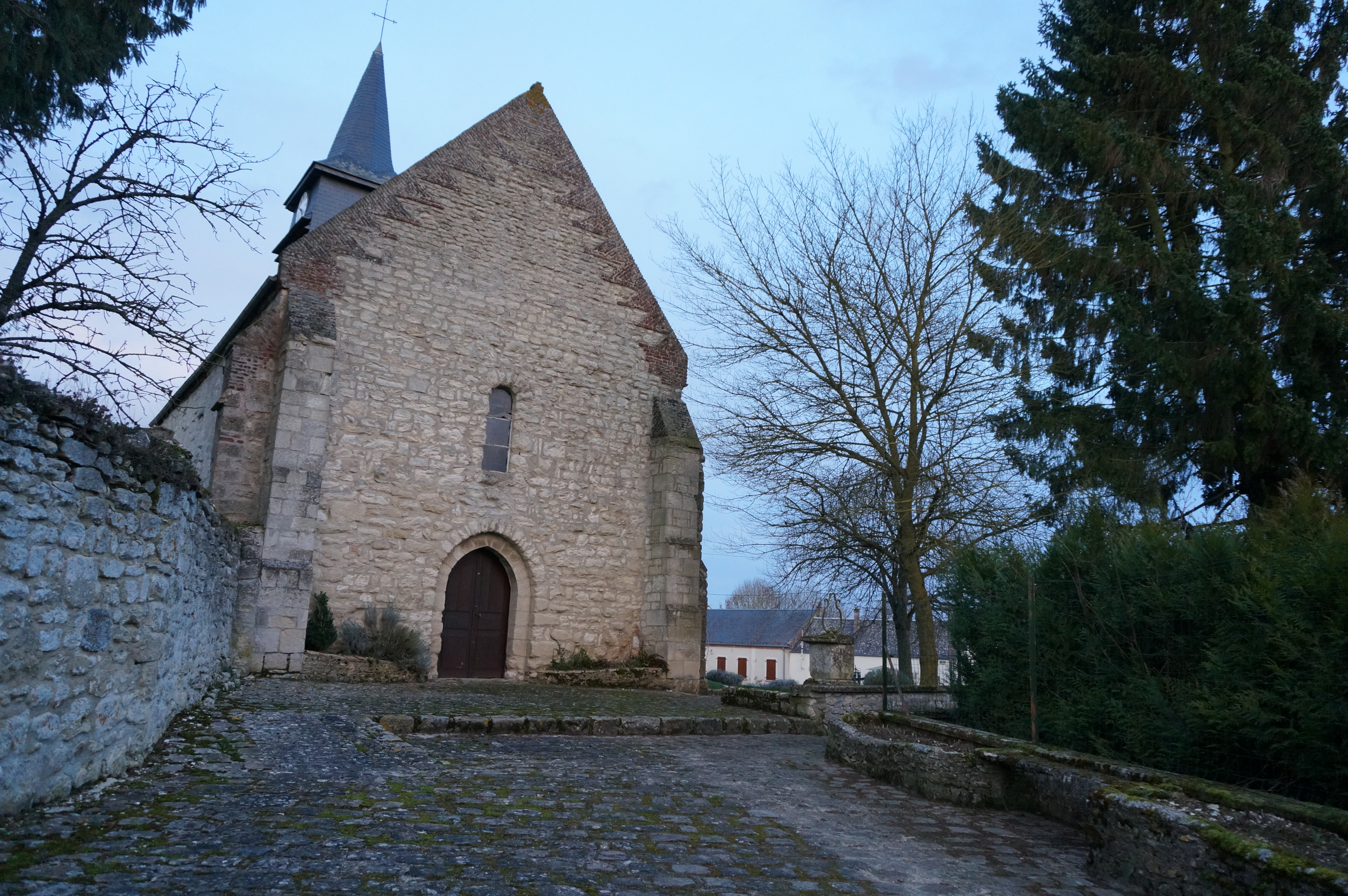 Vue de la commune deCuirieux.